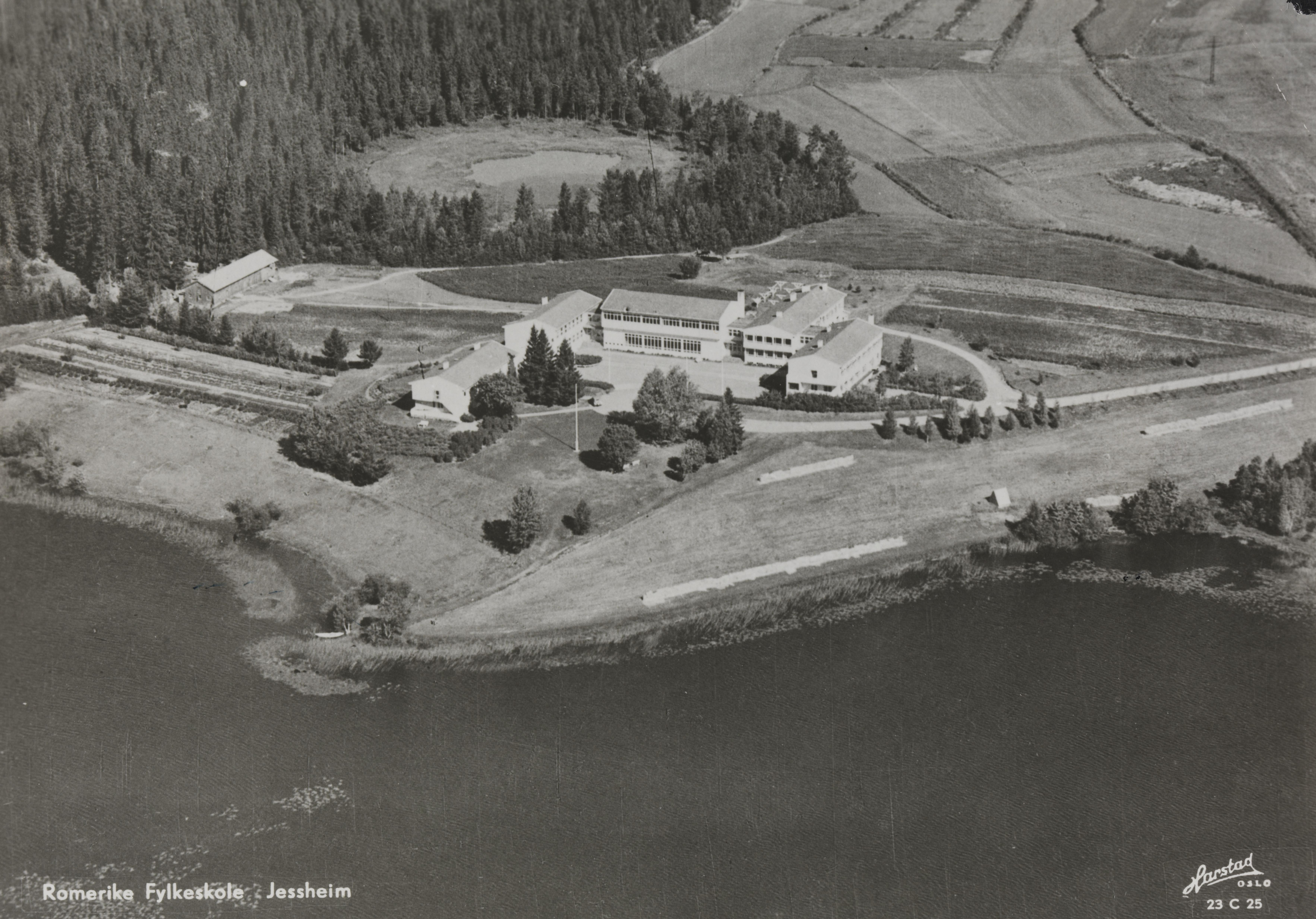 Bildet er hentet fra Nasjonalbibliotekets bildesamling Jessheim, Ullensaker, Akershus